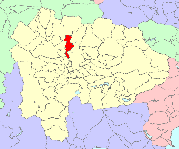 山梨県中巨摩郡敷島町の位置画像。